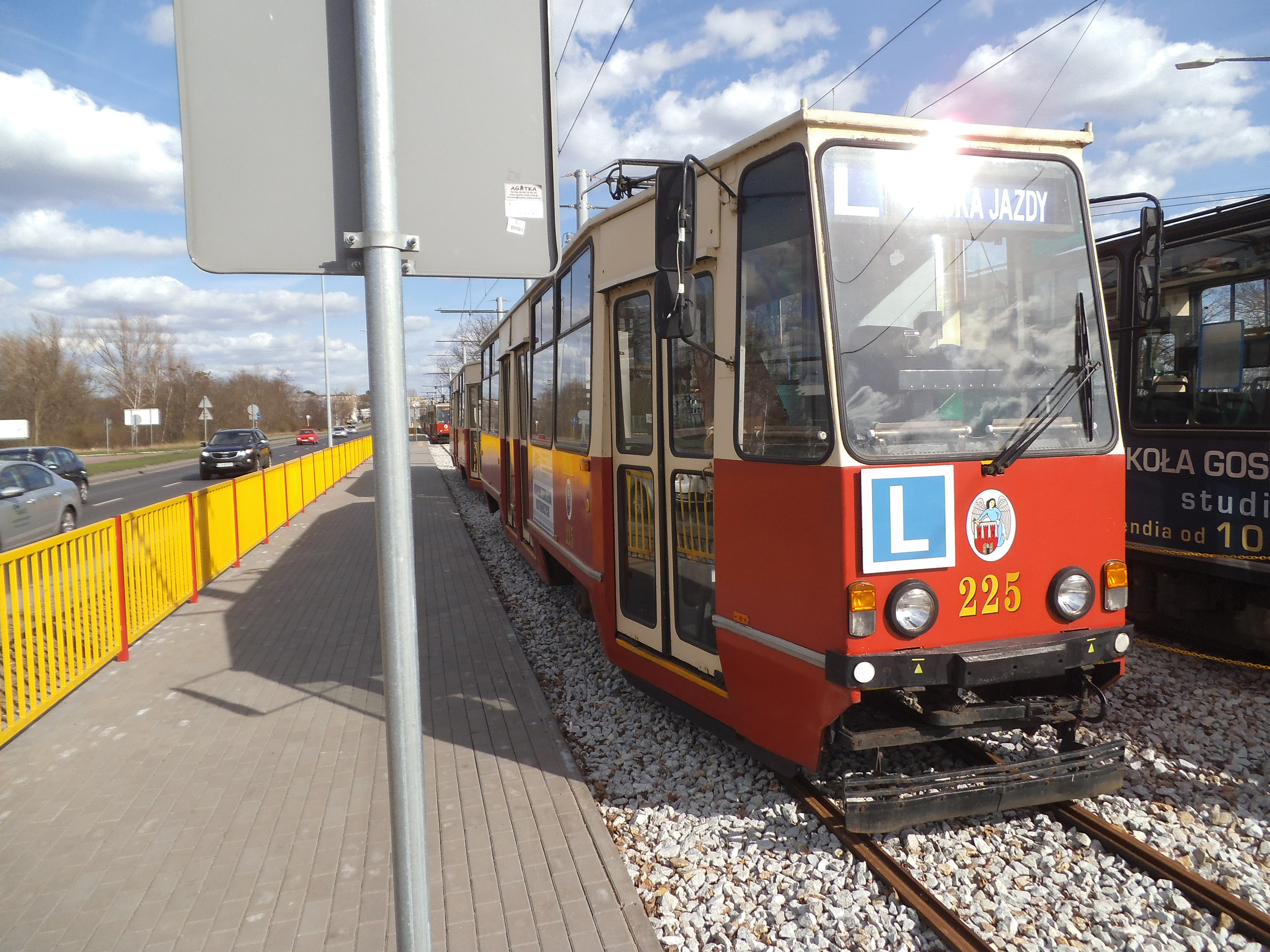 805 Na-szkoleniowy